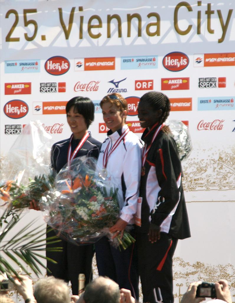 Luminita Talpos, Tomo Morimoto, Beatrice Omwanza - Vienna City Marathon 2008